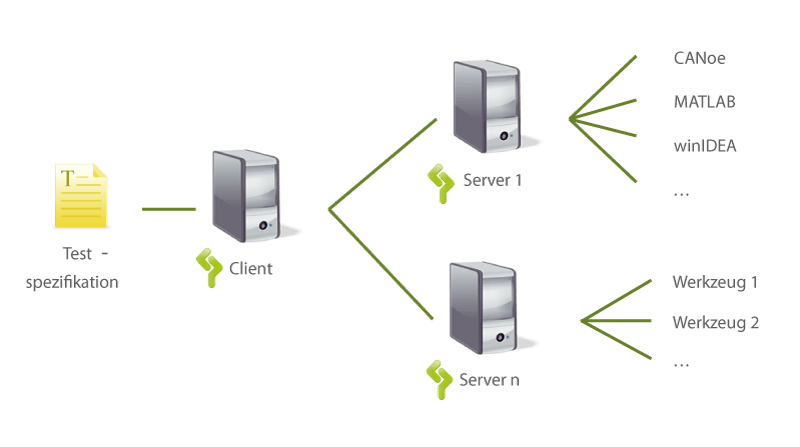 Schematische Darstellung des Testframework ContinoProva